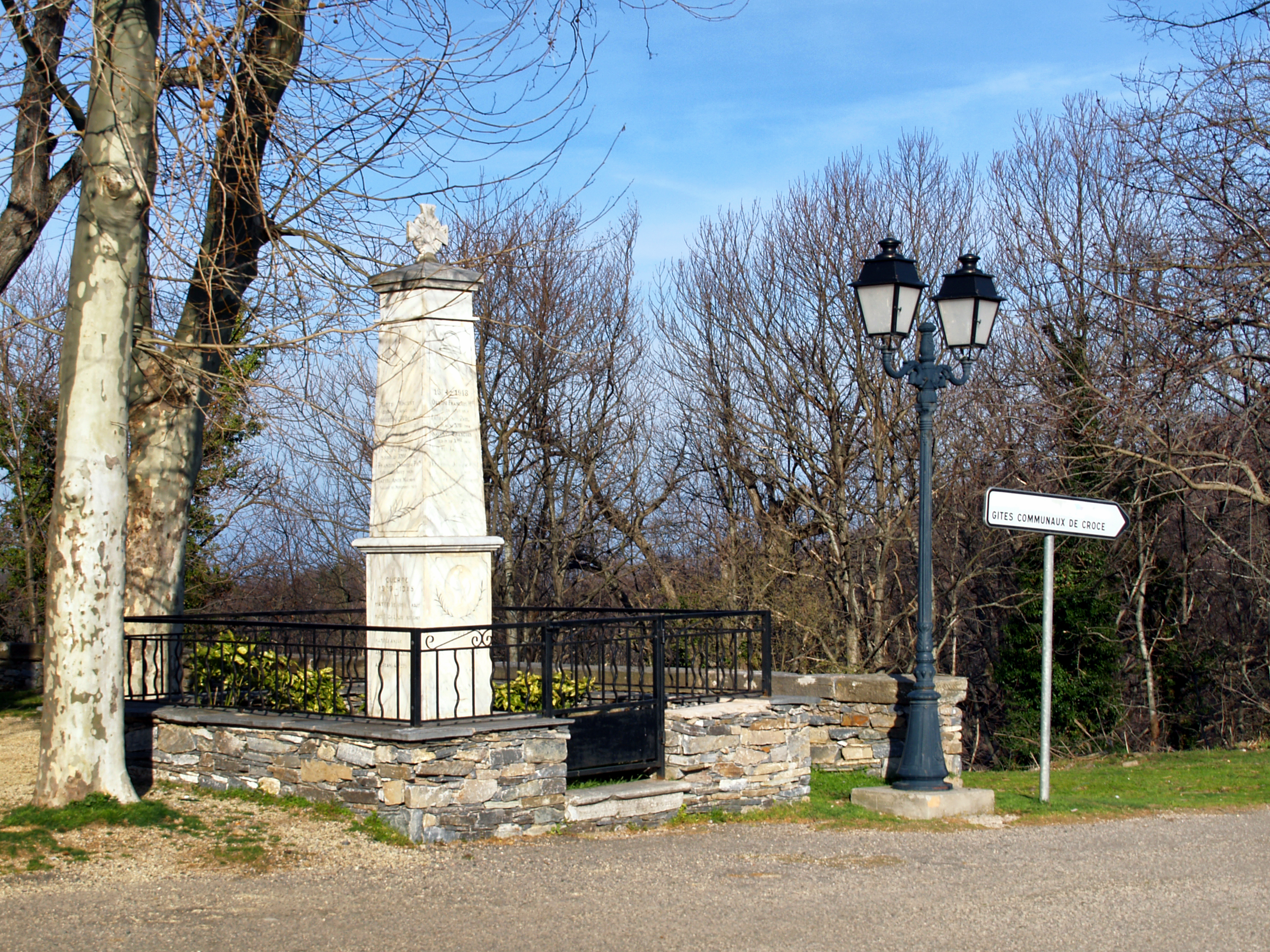 Croce, Castagniccia (Corse) - Monument aux morts